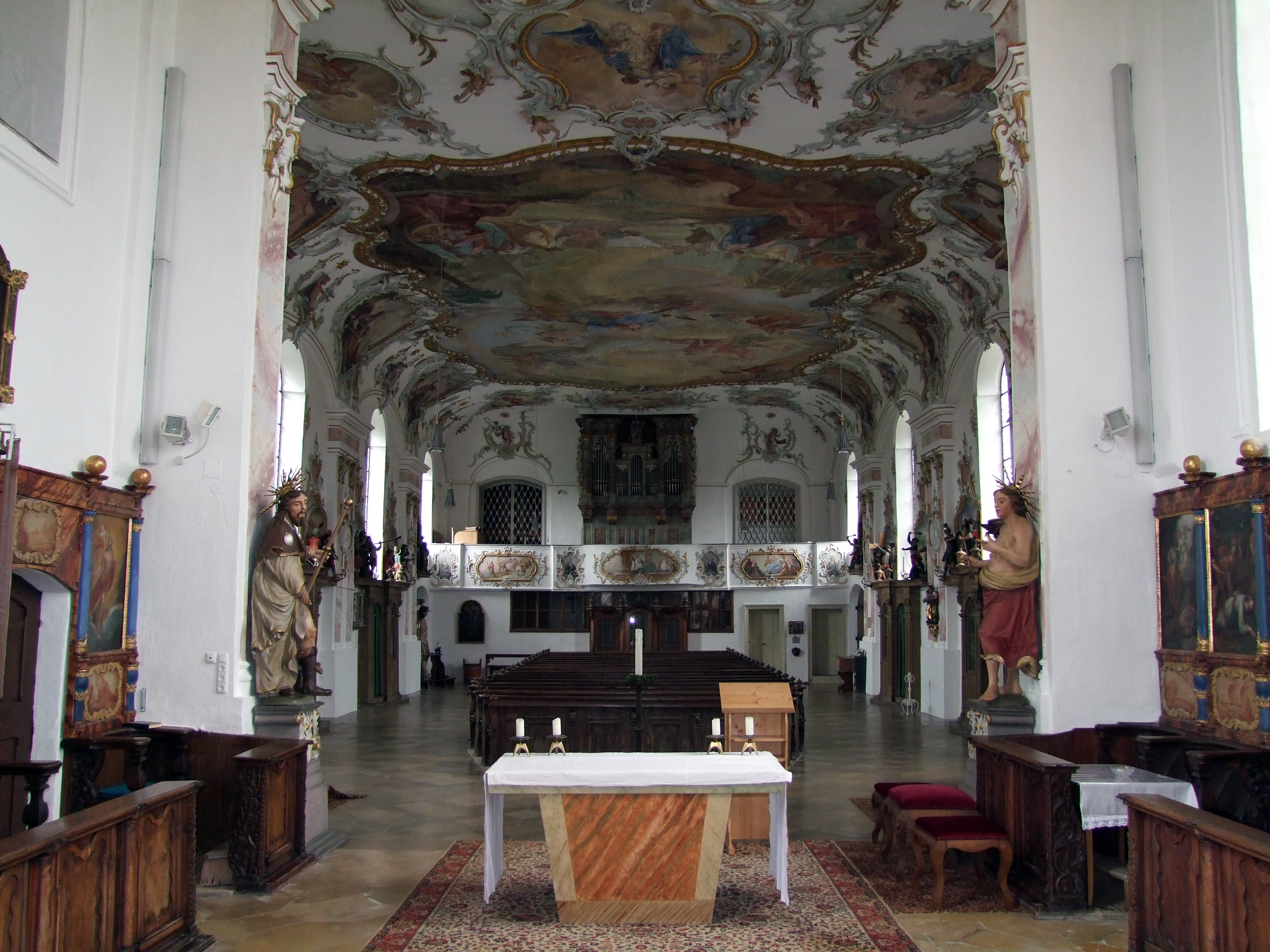 Kirchenschiff vom Chor aus.